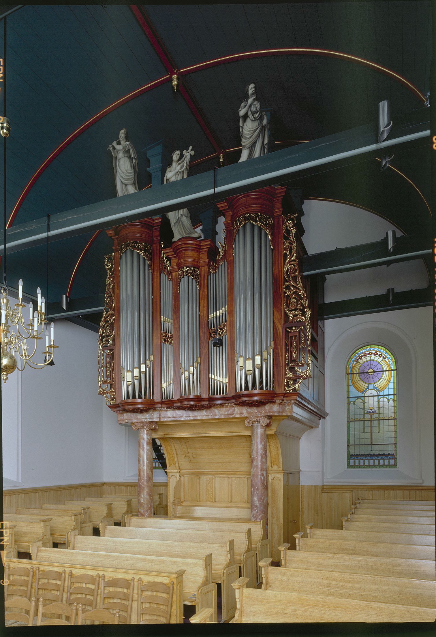 Hervormde Kerk: Interieur, aanzicht orgel, orgelnummer 123 (opmerking: Gefotografeerd voor Het Historische Orgel in Nederland 1840-1849)